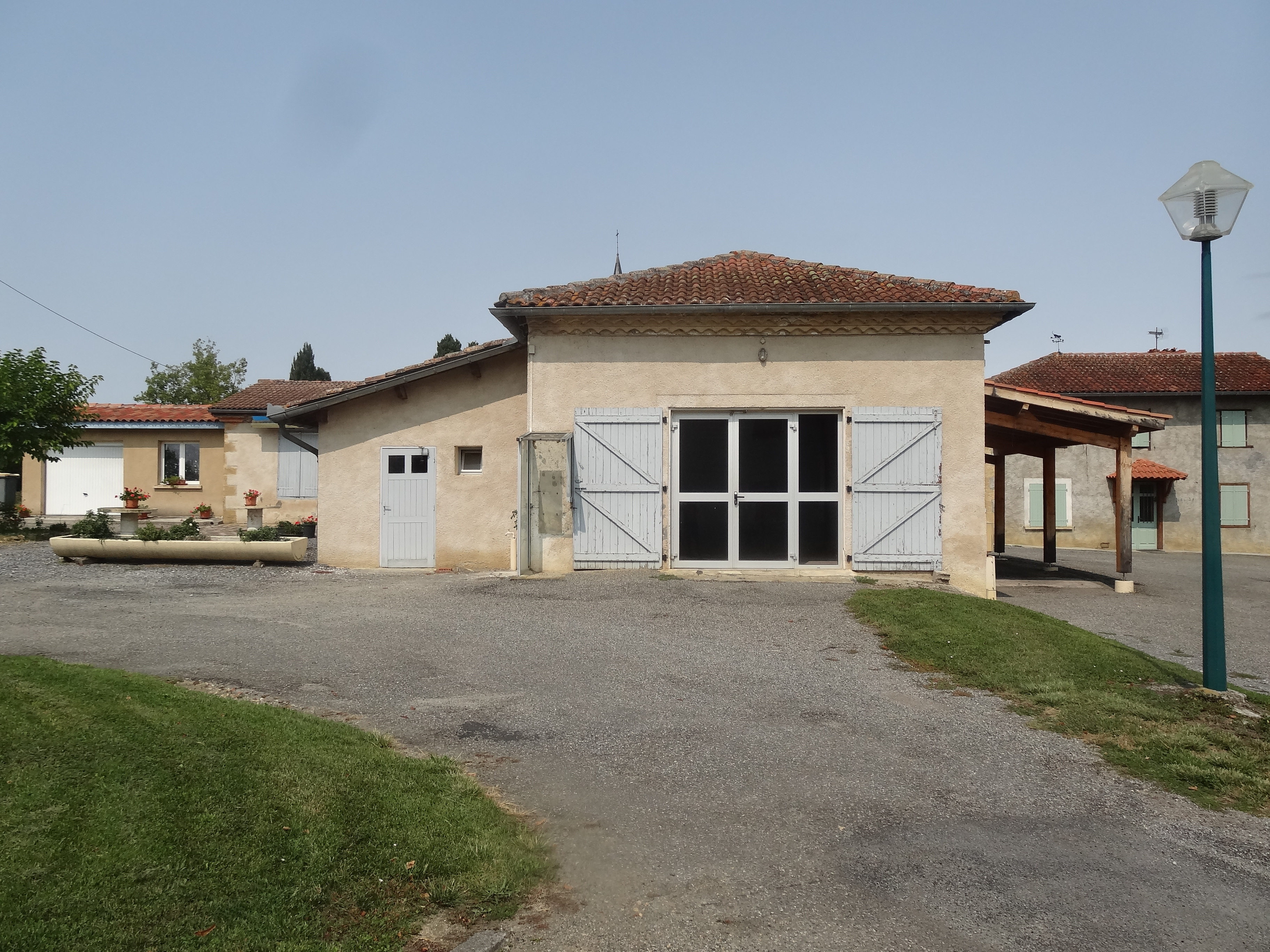 Salle des fêtes de Sère.